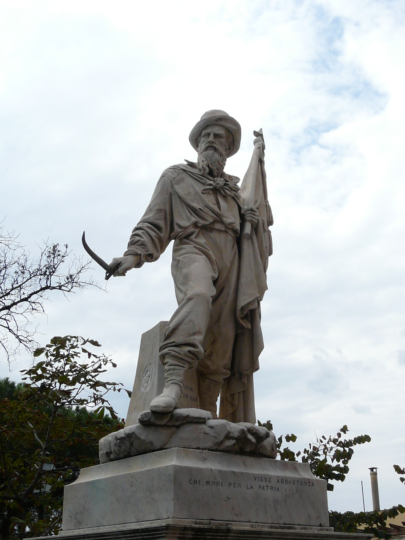 Monumento al garibaldino Simone Schiaffino, Camogli, Liguria, Italia